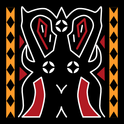 pa'tedong (buffalo), a Torajan pattern